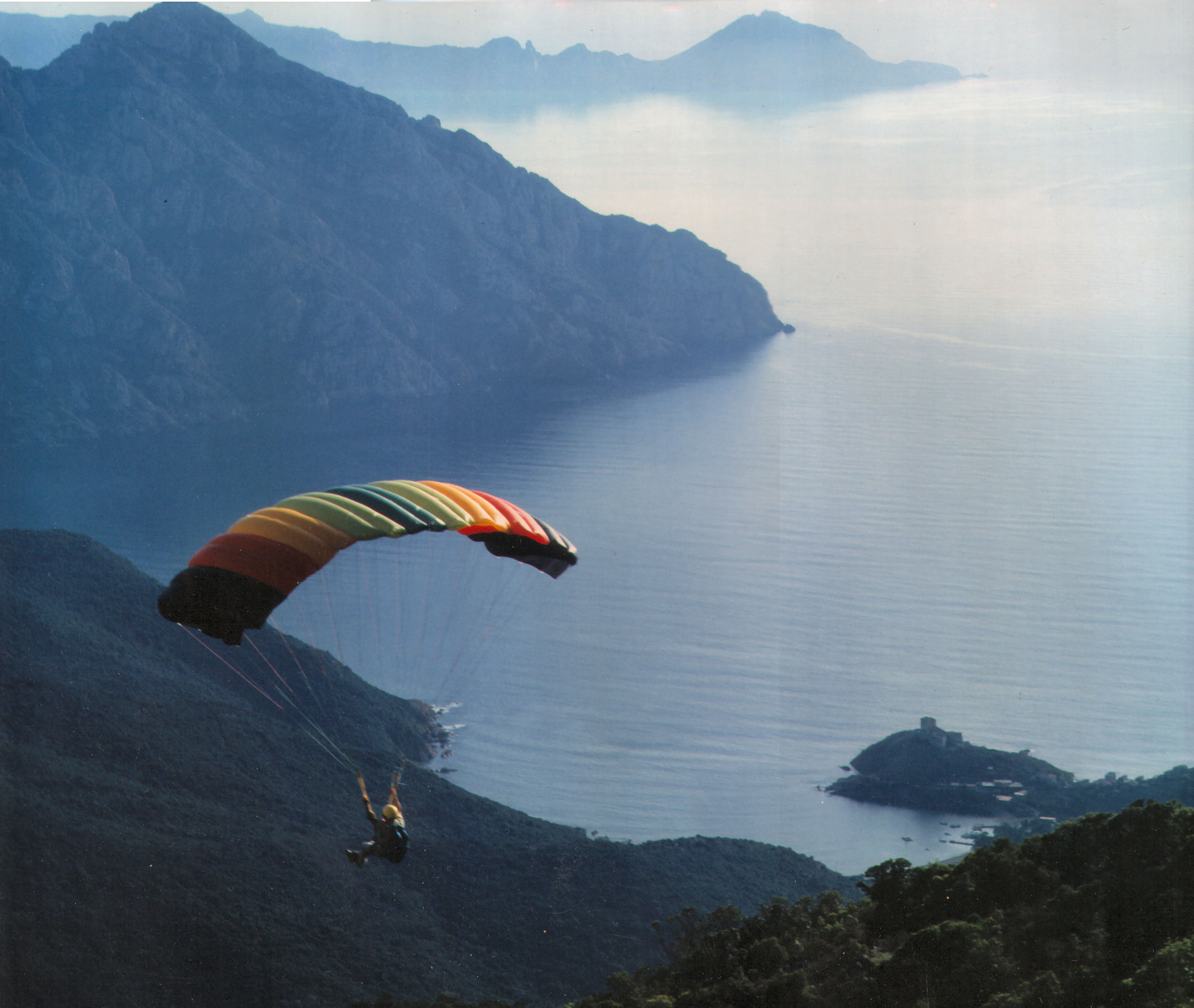 Bucht von Girolata mit Zitadelle